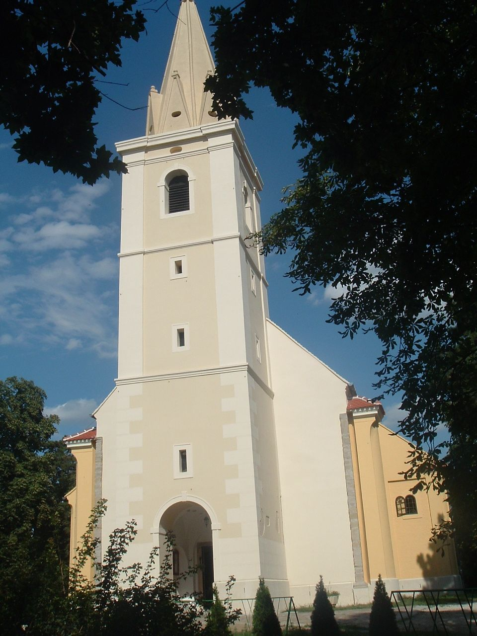 Roman Catholic Church in Bük, Hungary. Szent Kelemen pápa és vértanú római katolikus templom